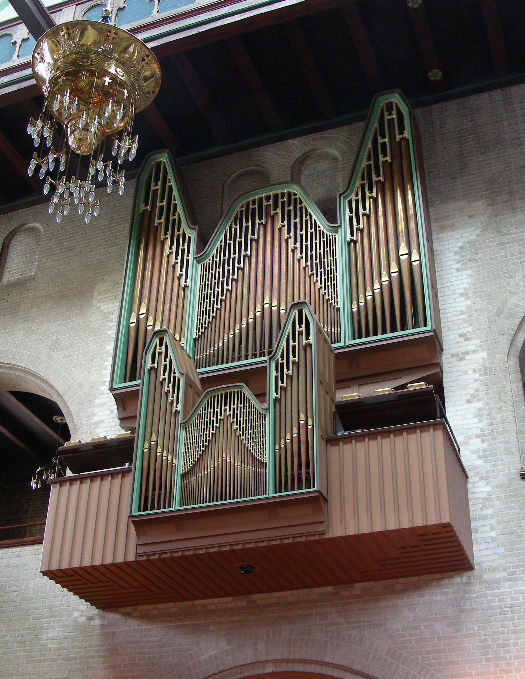 Elias Kirken in Copenhagen, Denmark. Organ.